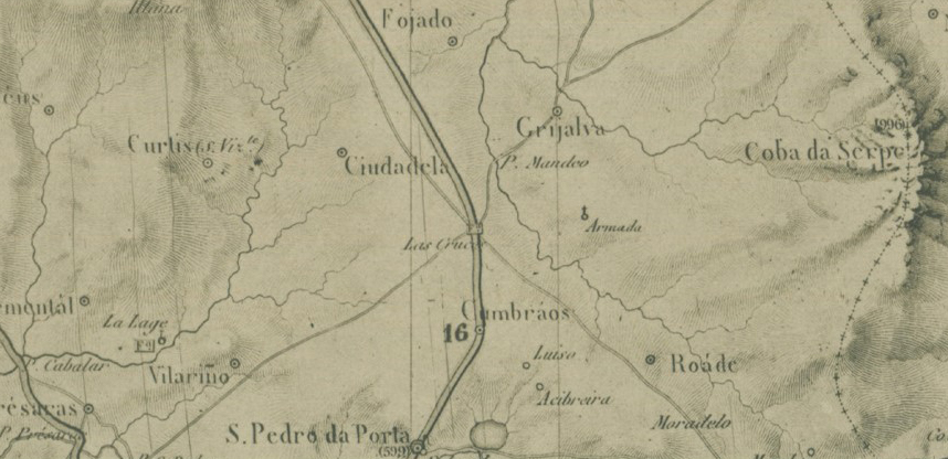 As Cruces (Sobrado) na Carta geométrica de Galicia con el trazado de ferro-carriles y carreteras kilometradas, año de 1917.